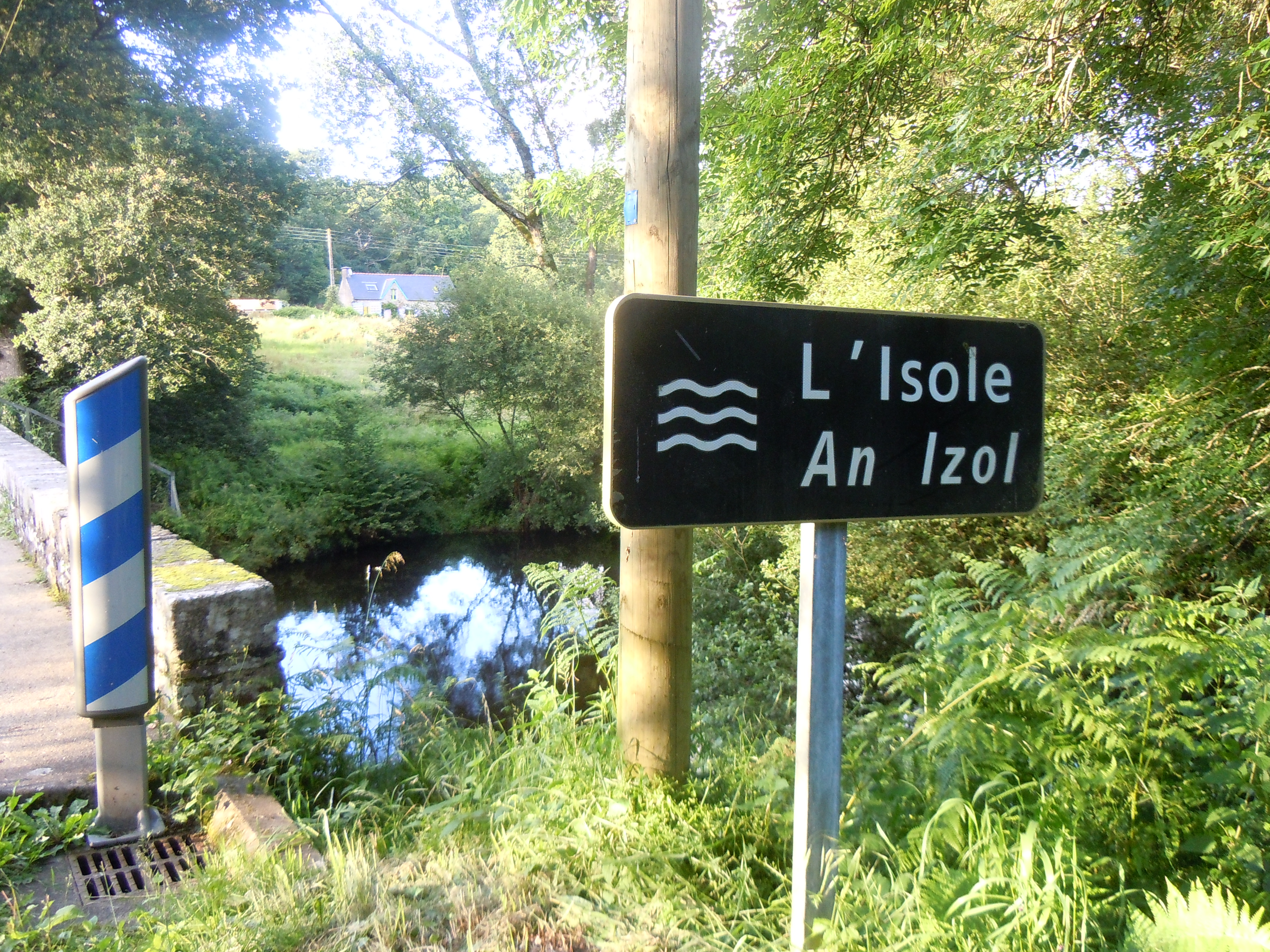 panneau routier situé à proximité du pont routier de Pont ar Scluz franchissant l'Isole (Finistère, France)